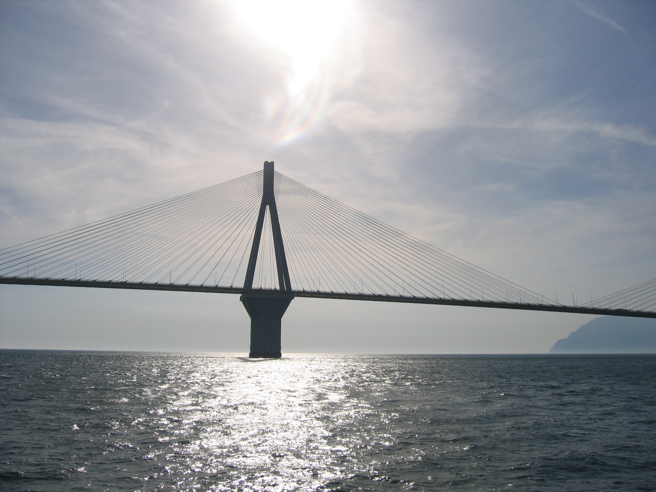 Rion Antirio Bridge - Rio-Andirrio-Brücke - Γέφυρα Ρίου-Αντιρρίου Géfyra Ríou-Andirríou - Charilaos-Trikoupis-Brücke